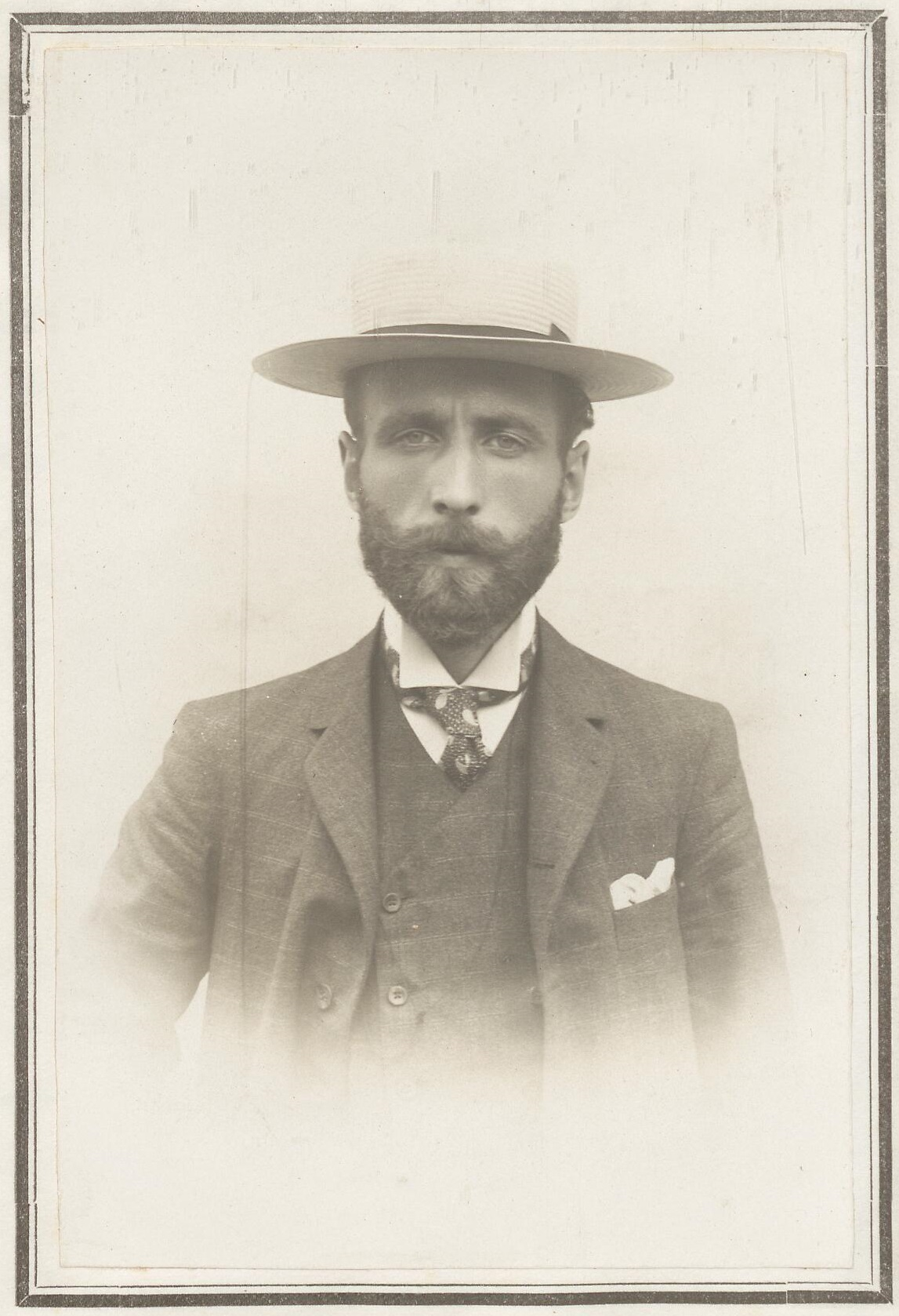 Sultan Abdülhamid'e düzenlenen suikaste karışan Belçikalı Edvar Joris